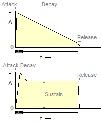 Voorbeelden van envelopes: die van een gitaar en die van een viool.